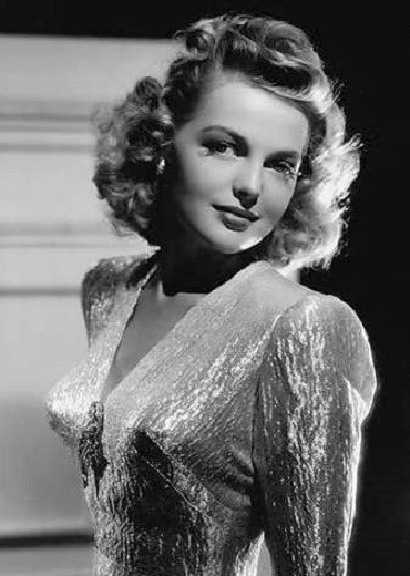 Elyse Knox, foto pubblicitaria